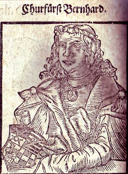 Bernhard, Herzog zu Sachsen, Egern und Westphalen, Erzmarschall des Heiligen Römischen Reiches Deutscher Nation, Markgraf zu Salzwedel, Graf von Askanien und Ballenstedt, Herr zu Bernburg Holschnitt von 1598